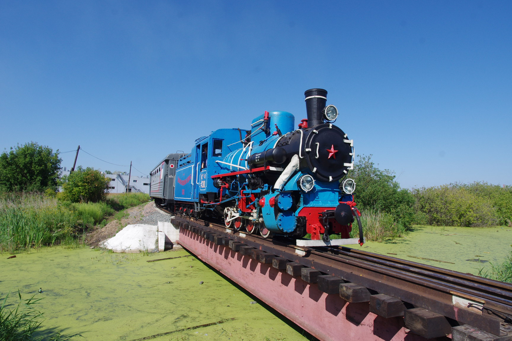 Случайно оказался у Малой Горьковской железной дороги, а на ней сегодня паровоз